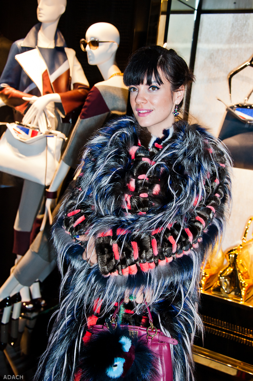 Fendi store opening, 2014 - Lily Allen